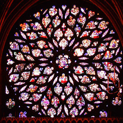 Sainte-Chapelle, Paris, Fensterrosette